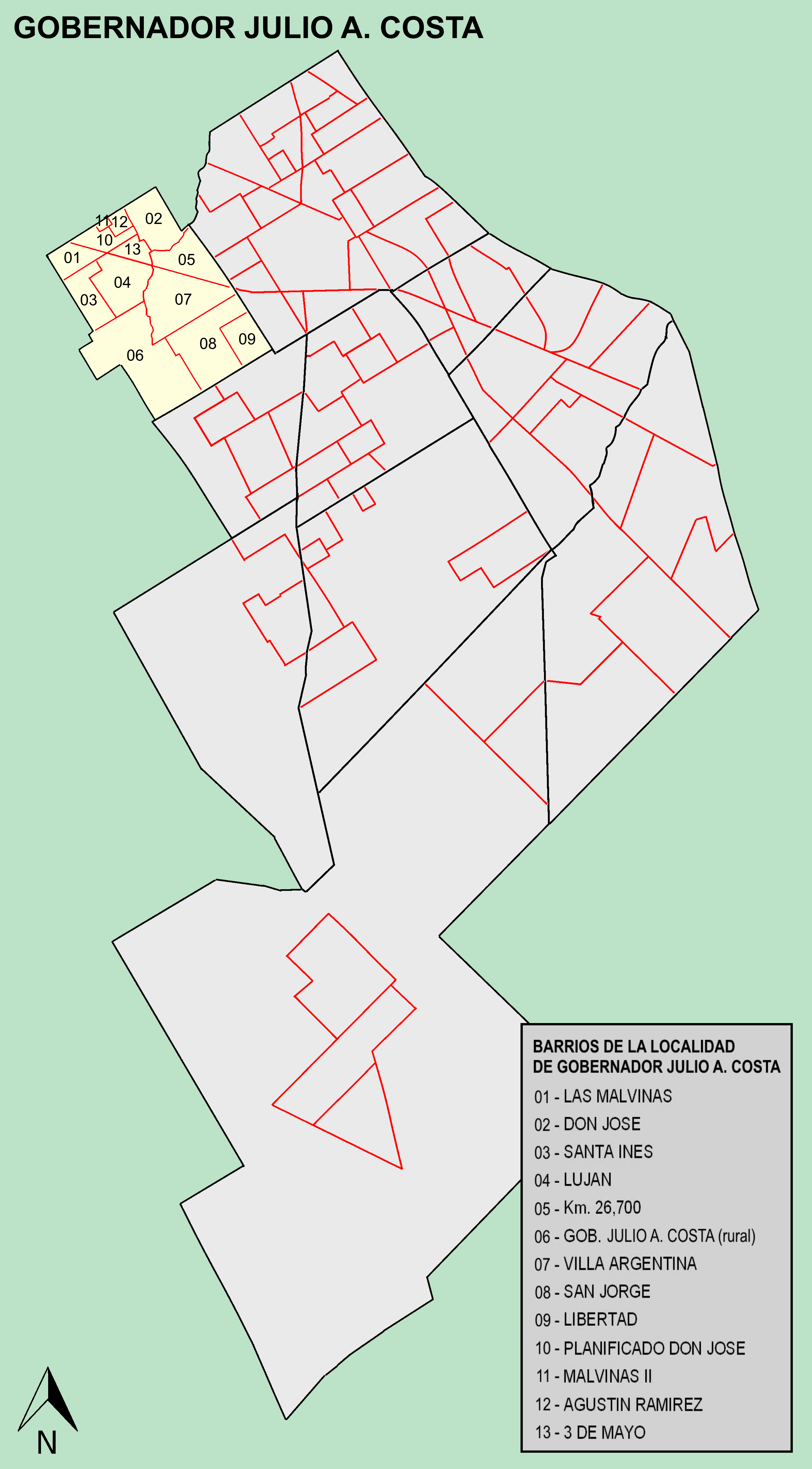 Mapa barrios de Gobernador Costa